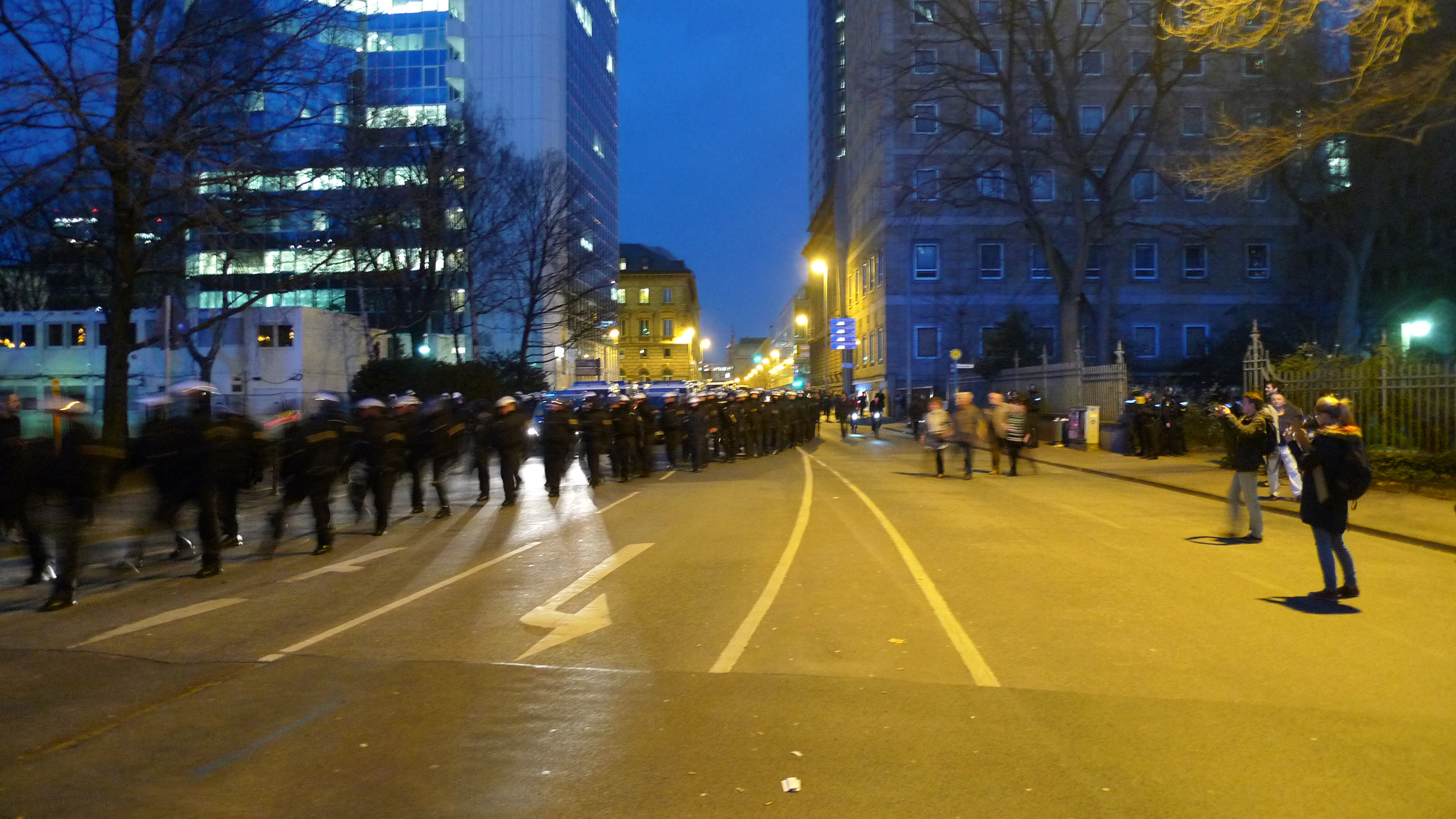 blockupy 2015